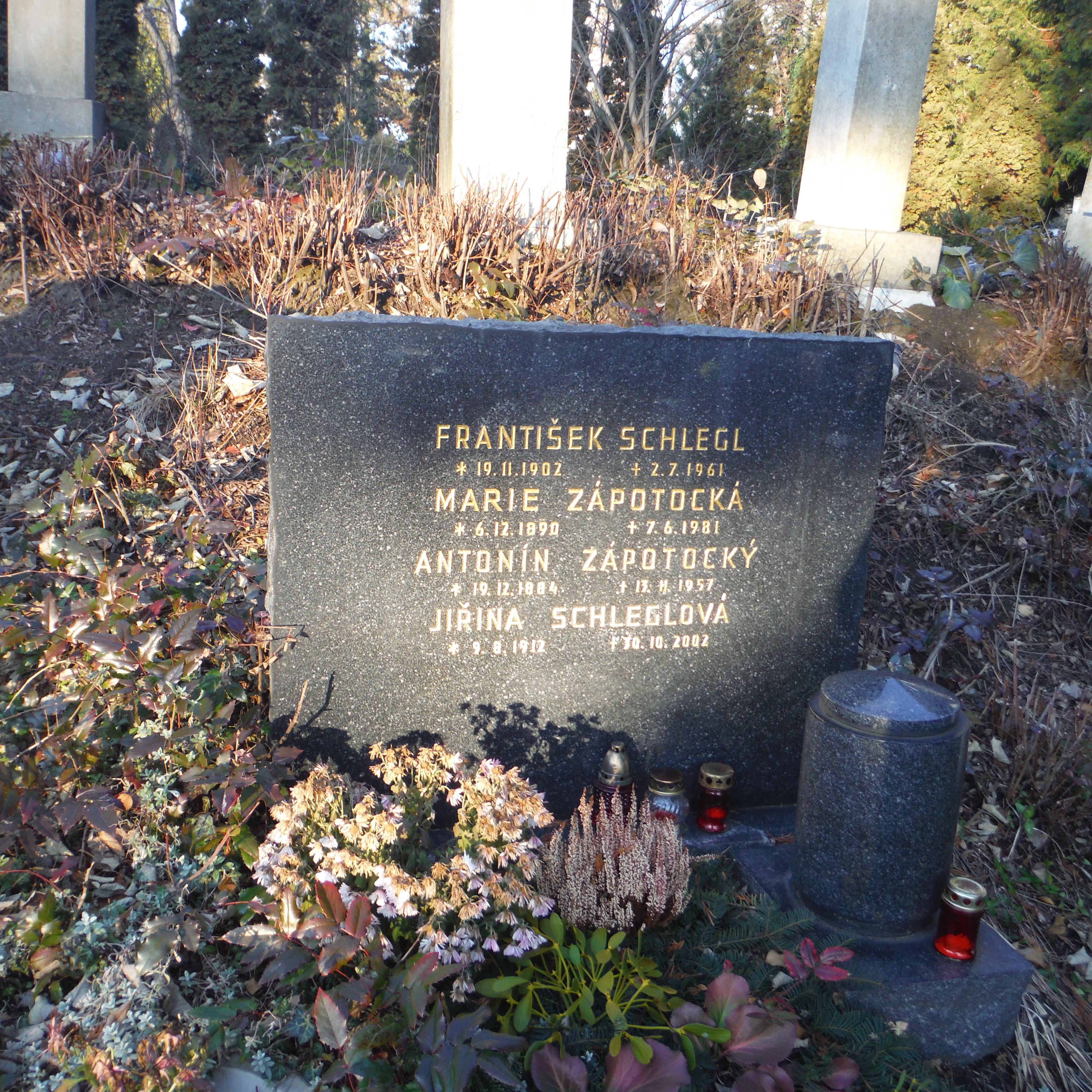 hrob